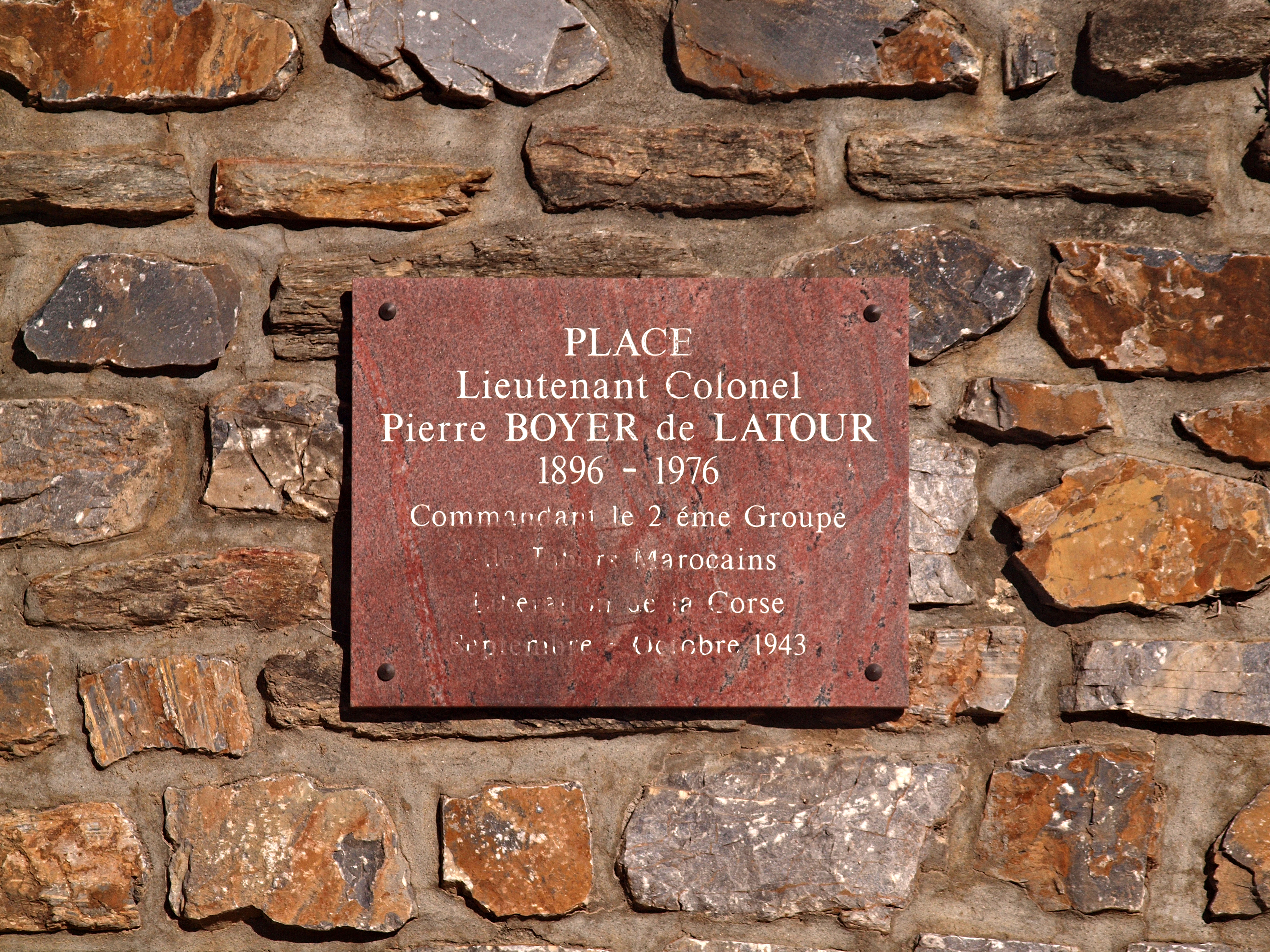 Barbaggio (Corse) - Plaque apposée sur la place du village appelée « Place du lieutenant-colonel Pierre Boyer de Latour »